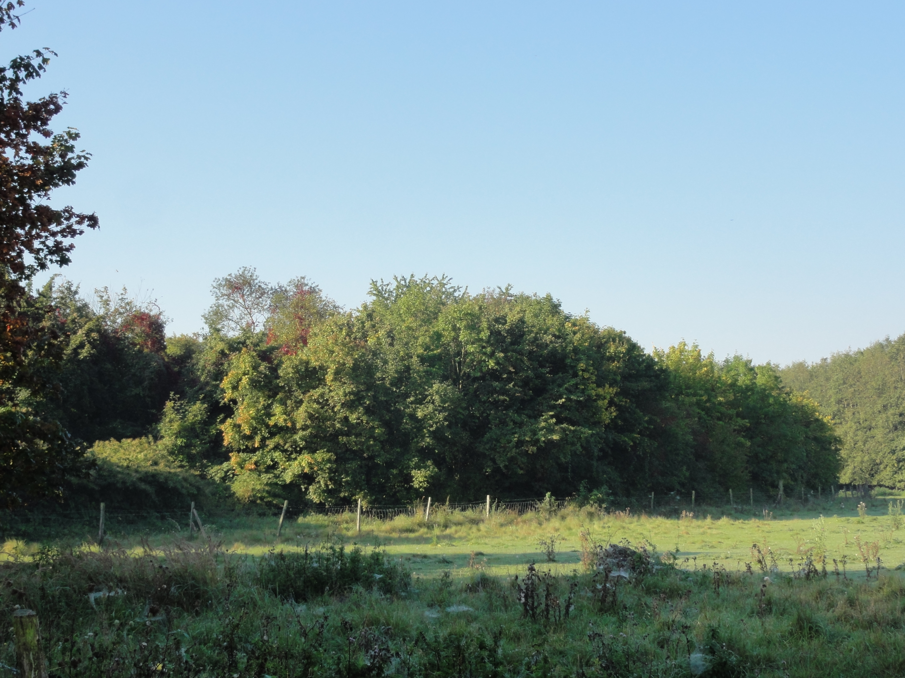 Terril n° 183 dit Soult, Fosses Soult de la Compagnie des mines de Thivencelle, Fresnes-sur-Escaut, Nord, Nord-Pas-de-Calais, France.